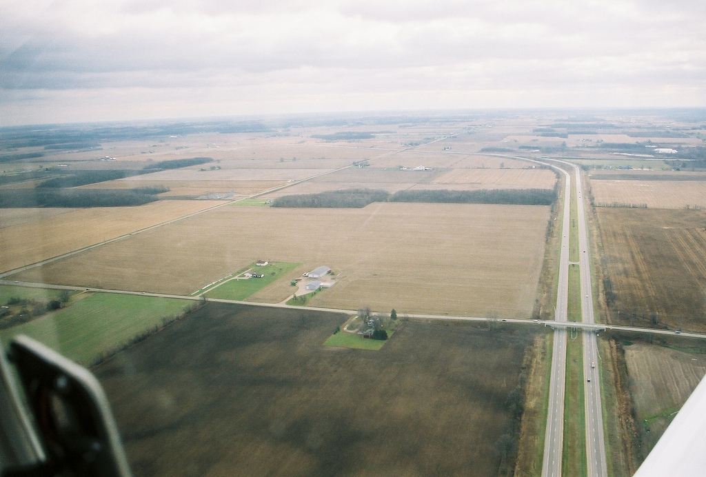 985519-R1-08-17_009_0001